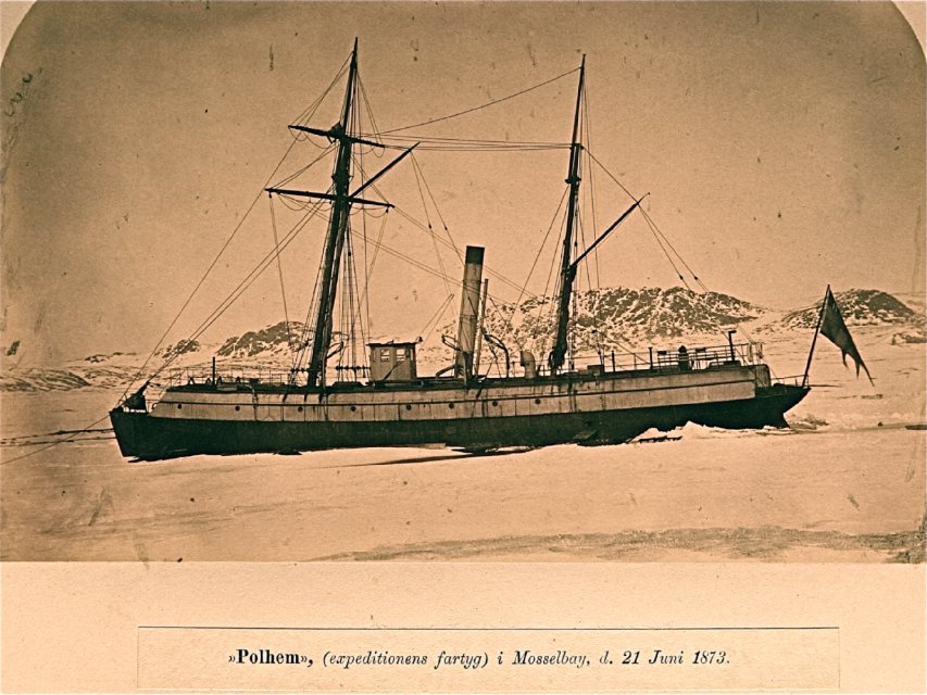 Expeditionsfartyget Polhem vid Mosselbukten 1873